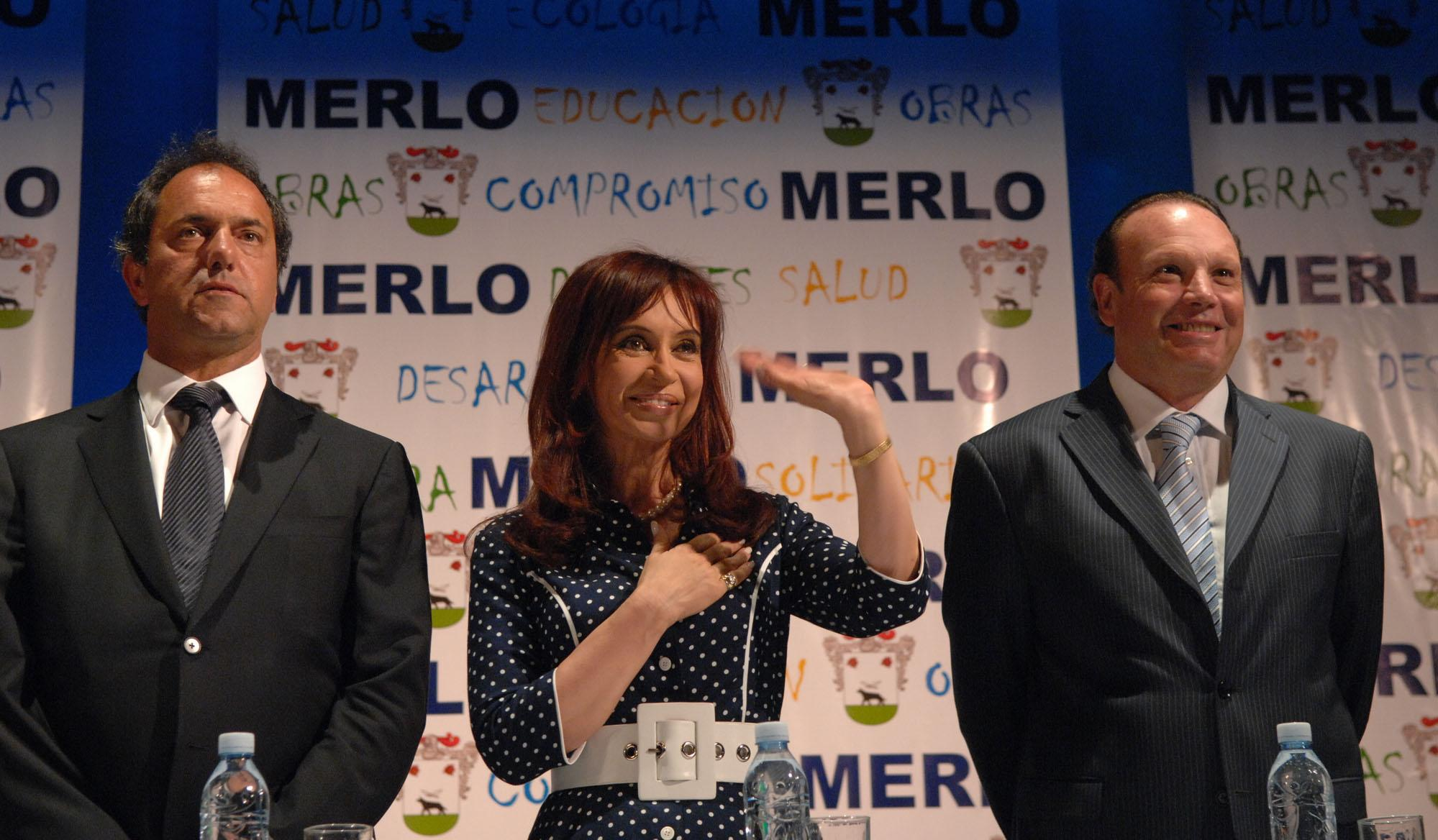 Cristina Fernández de Kirchner, Presidenta de la Argentina, junto al gobernador de la provincia de Buenos Aires Daniel Scioli (izquierda) y el intendente del partido de Merlo Raúl Othacehé (derecha).